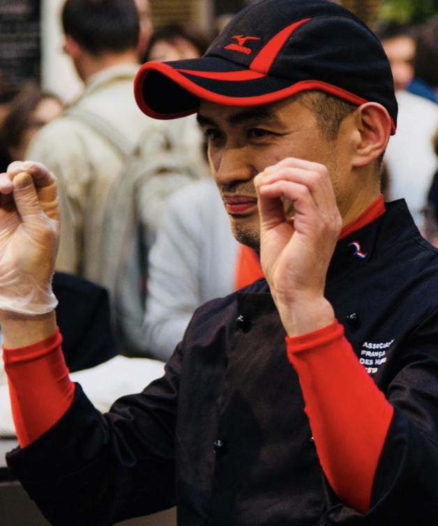 Hissa, Masterchef